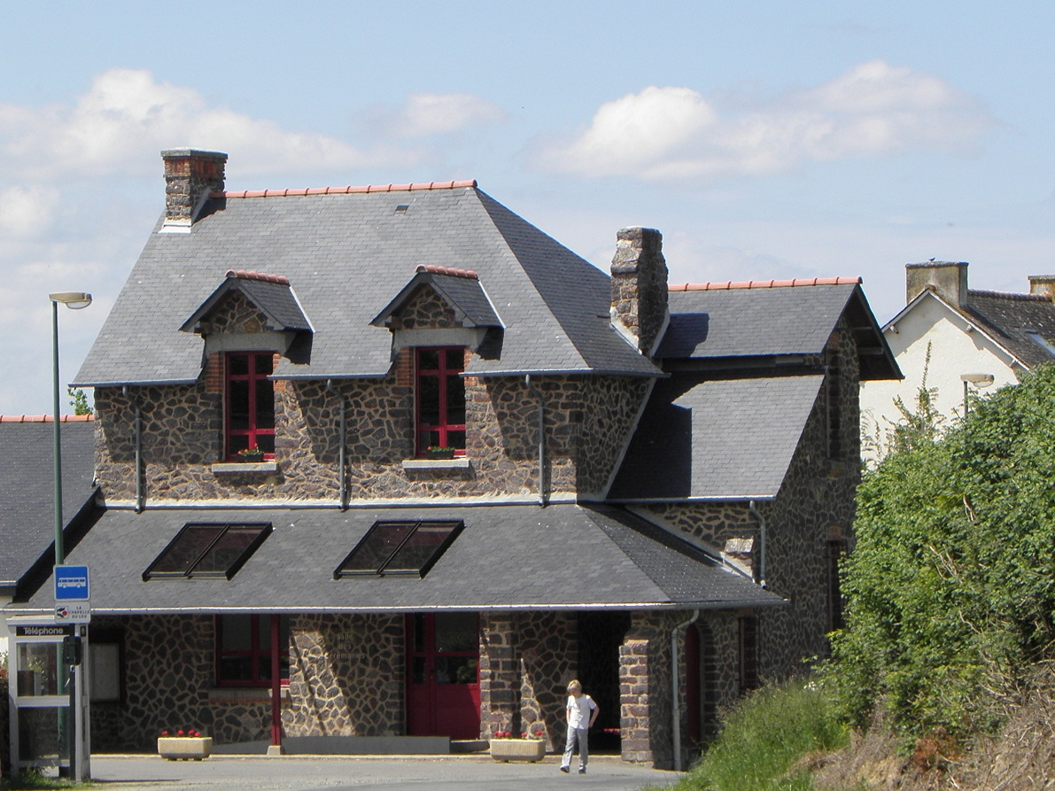 Mairie de La Chapelle-du-Lou (35).